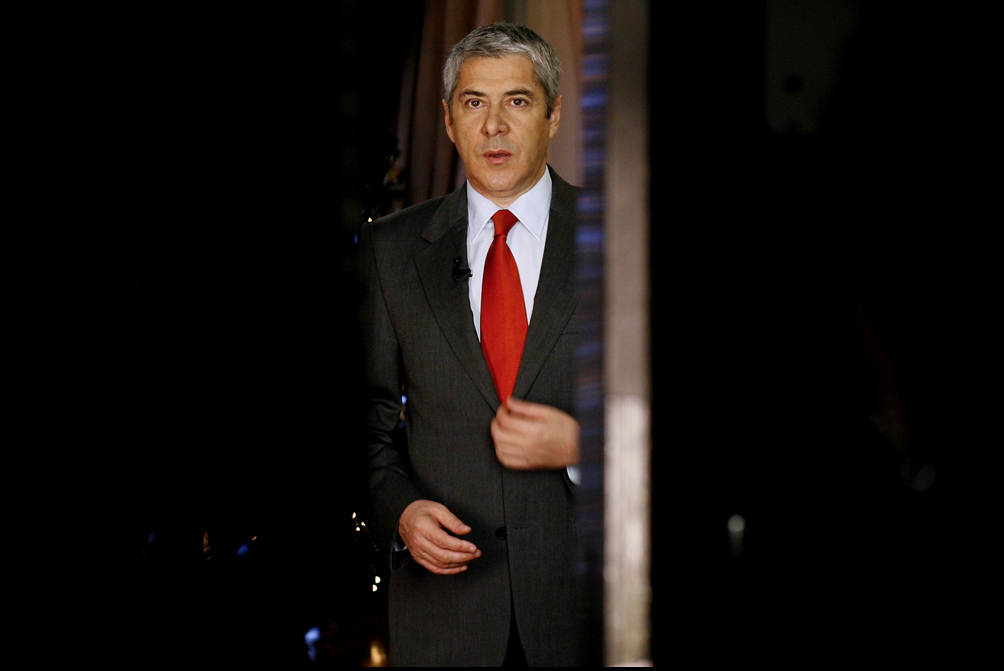 José Sócrates, durante as gravações da mensagem de Natal de 2008.